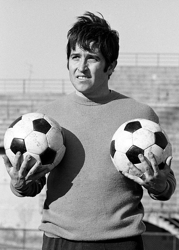 Giancarlo De Sisti